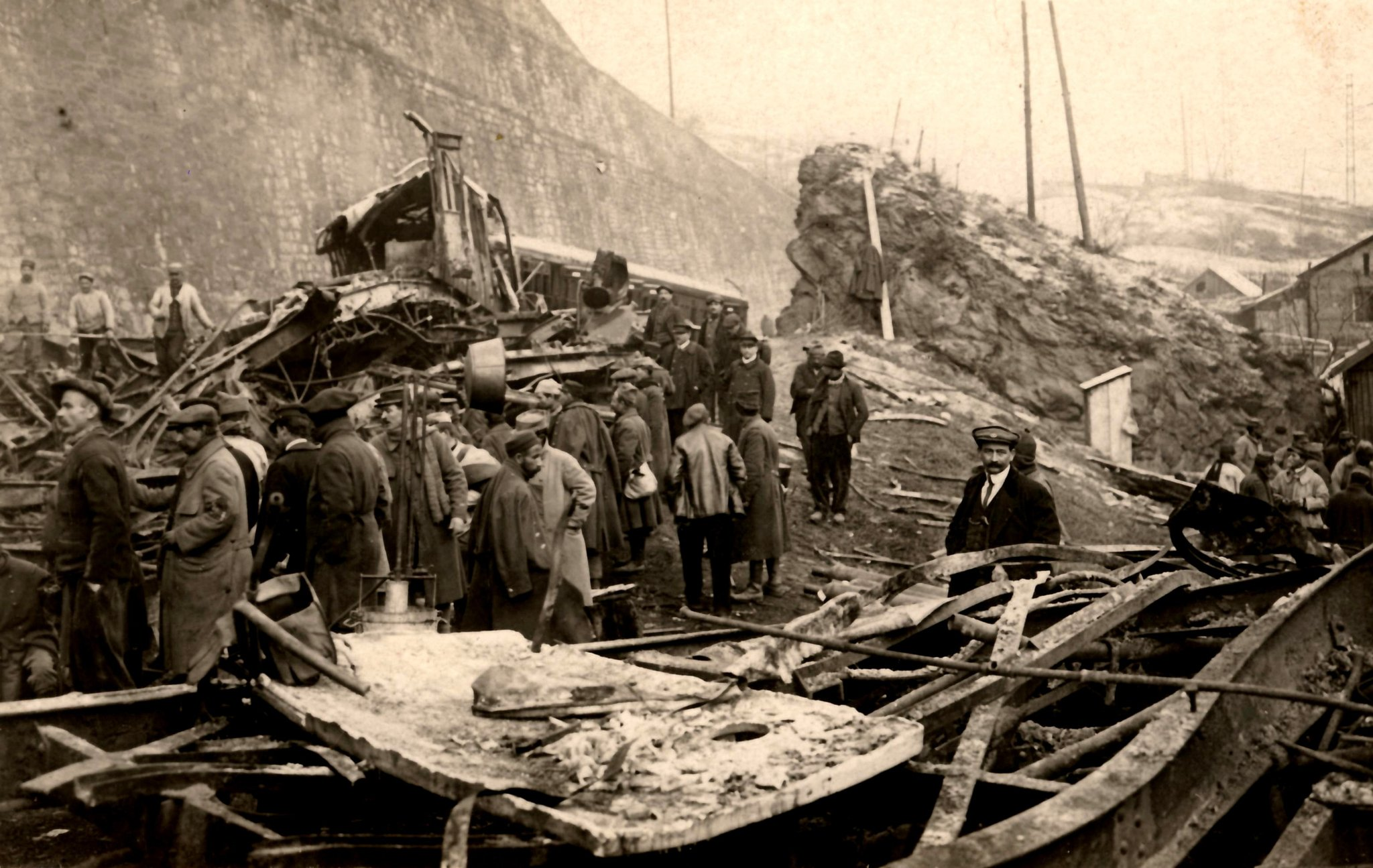 Opérations de déblaiement après l'accident ferroviaire de Saint-Michel-de-Maurienne du 12 décembre 1917.